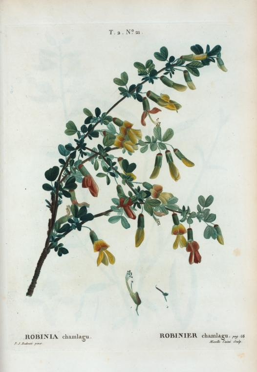 Robinia chamlagu = Robinier Chamlagu.